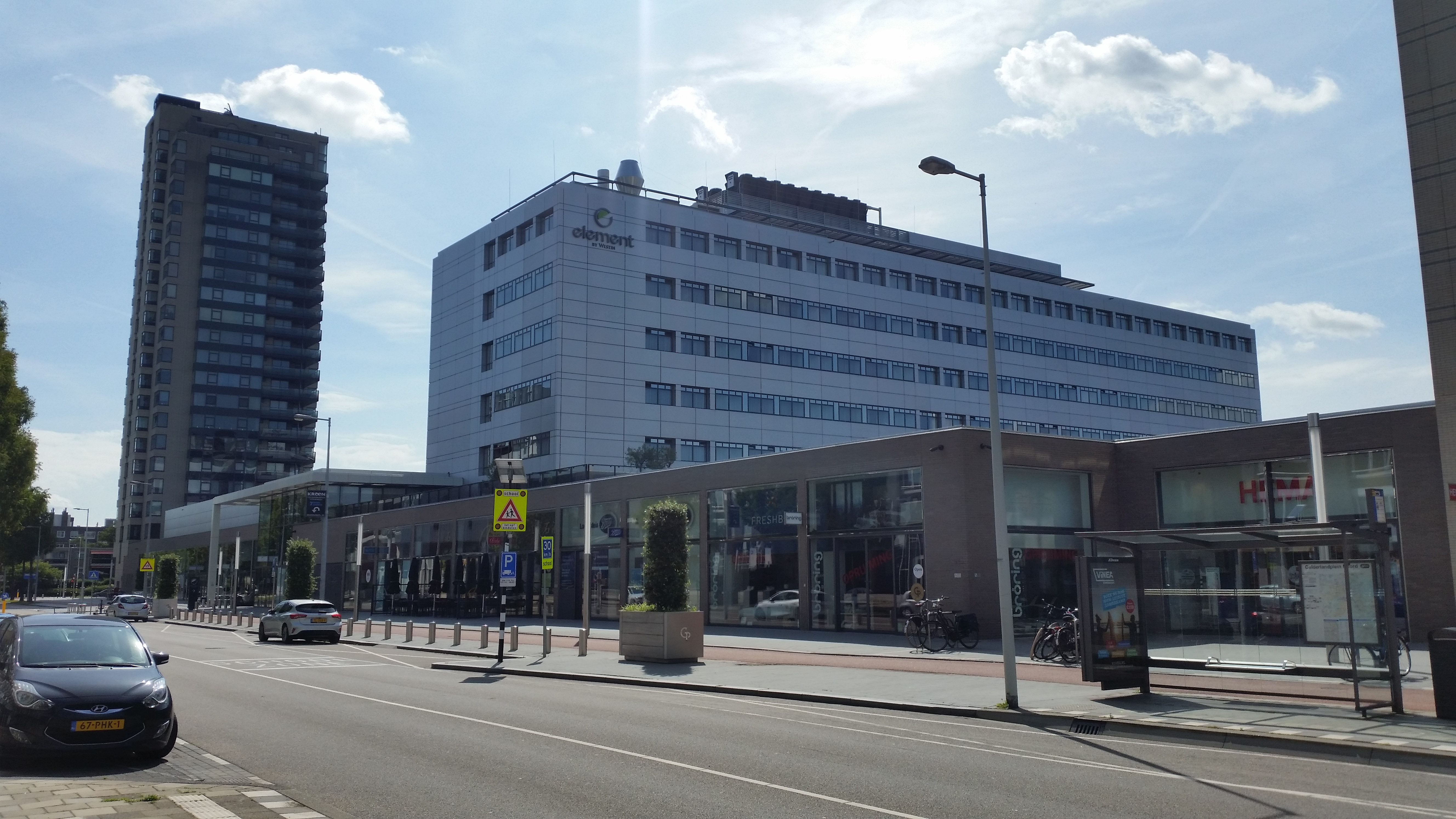 Gelderlandplein, Amsterdam, met daarop het hotel